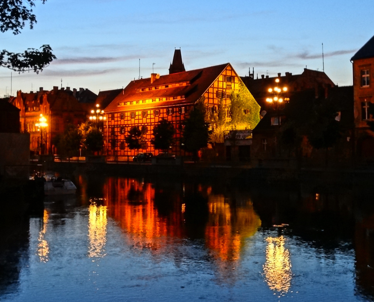 Spichlerz nad Brdą w Bydgoszczy przy ul. Stary Port zbud. w latach 30. XIX wieku